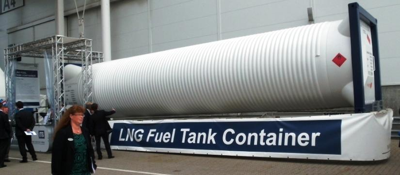 LNG-Tankcontainer